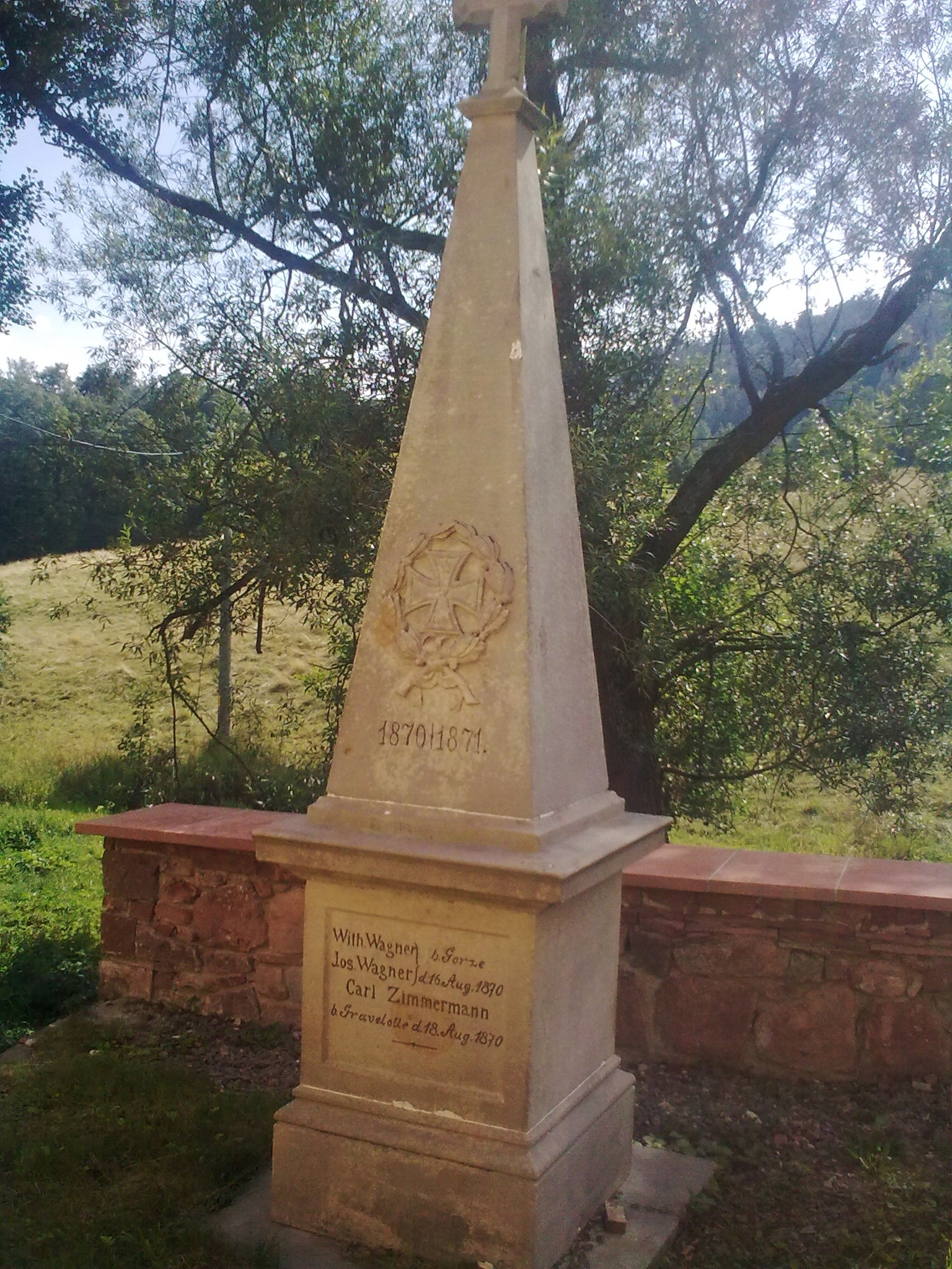 Krajanów. Pomnik ofiar wojny francusko-pruskiej